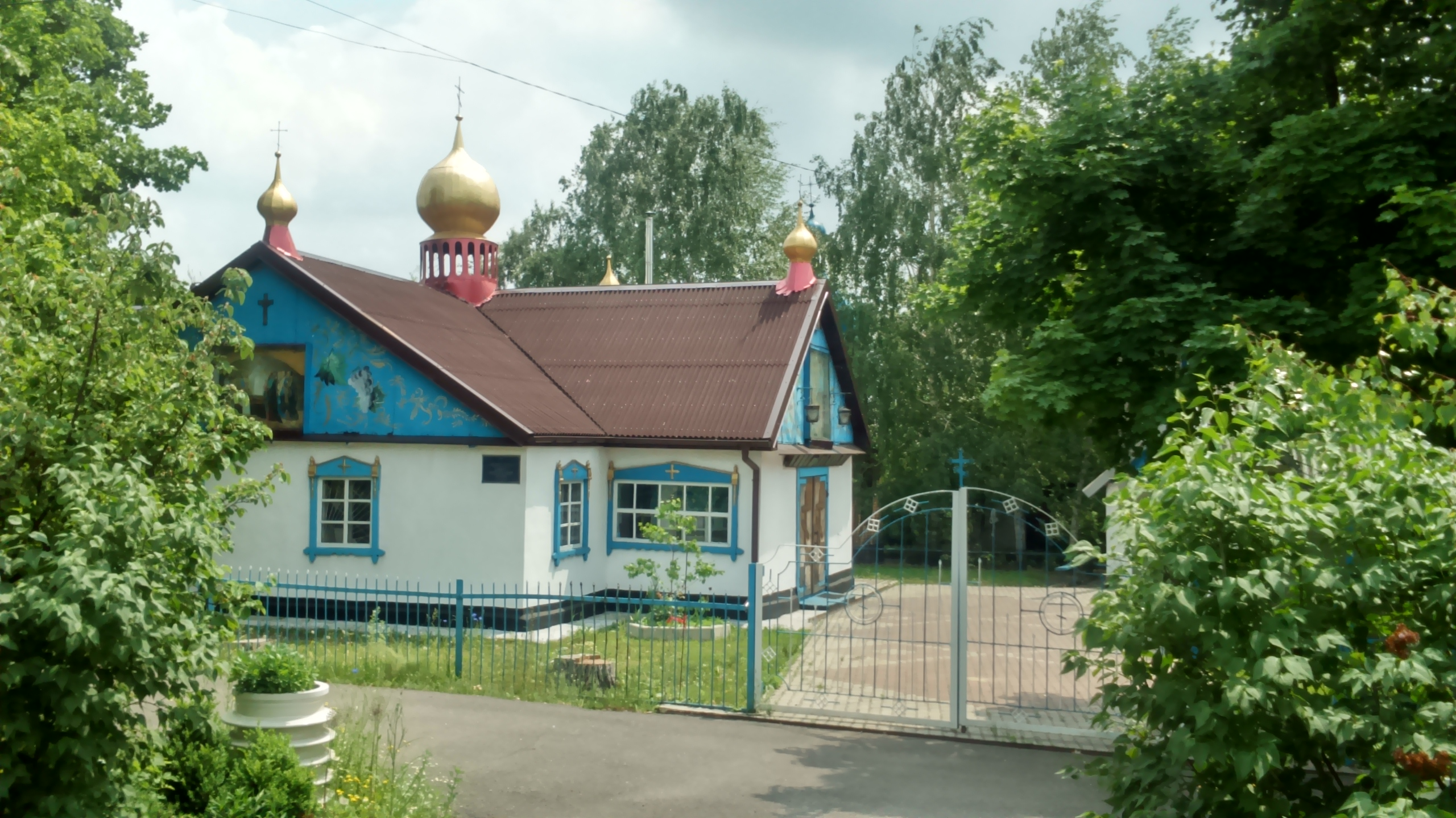 У селищі Святогорівка — Успенський храм. Престольне свято: Успіння Пресвятої Богородиці (28 серпня). Настоятель: протоієрей Анатолій Костенко. Адреса: 85020 п. Святогорівка Добропільського р-ну, вул. Шевченка, 49.